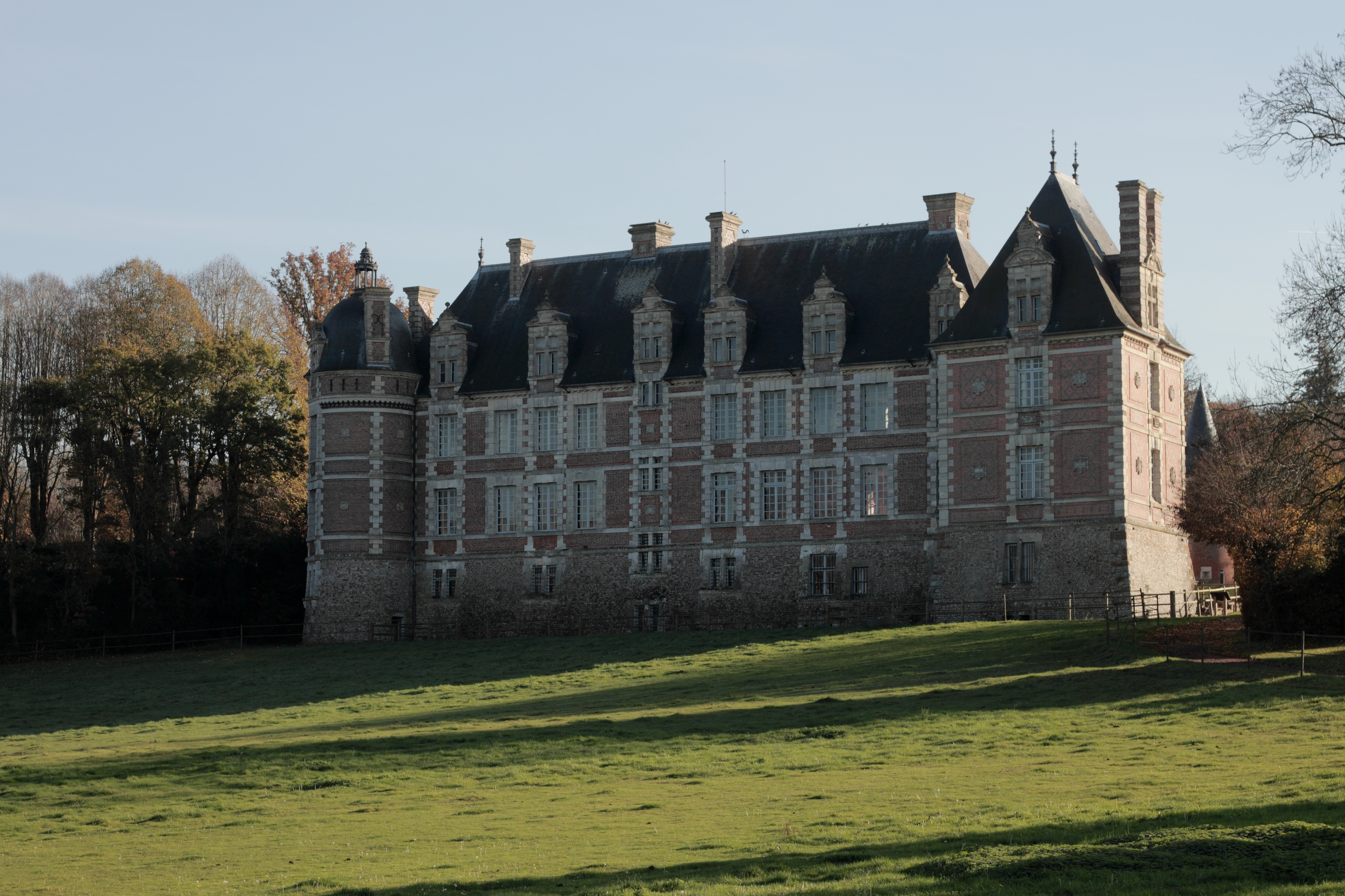 Le site de Chambray est à l'origine un poste fortifié dominant le gué de l'Iton, zone frontalière entre la Normandie rattachée à la couronne d'Angleterre et le comté de Chartres. Le manoir primitif fut abandonné vers 1210. Une forteresse, bâtie par la suite, fut rasée à la fin de la guerre de Cent Ans. Jacques de Chambray dit '" le Grand Veneur " fut célèbre dans l'Europe entière pour son équipage de chasse à courre qui prit 2466 cerfs. En souvenir du dernier descendant de la famille de Chambray, la donation faite à l'État permit d'installer un centre de formation agricole.